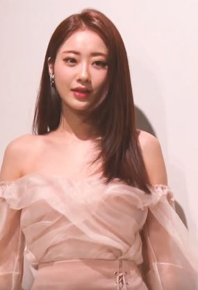 12일 오후 서울 JW 메리어트 호텔에서 한 코스메틱 브랜드의 국내 론칭 기념 행사가 열렸다.